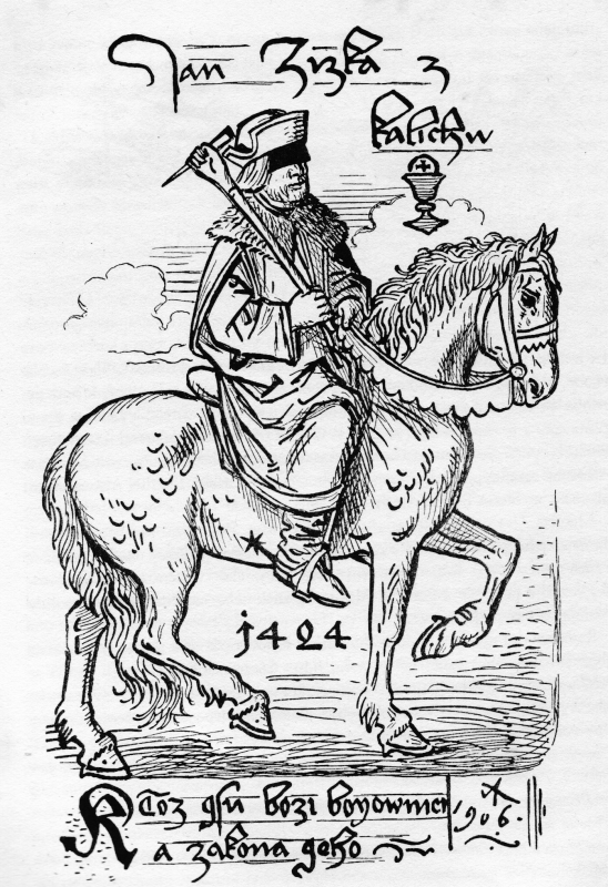 Jan Žižka z Kalicha